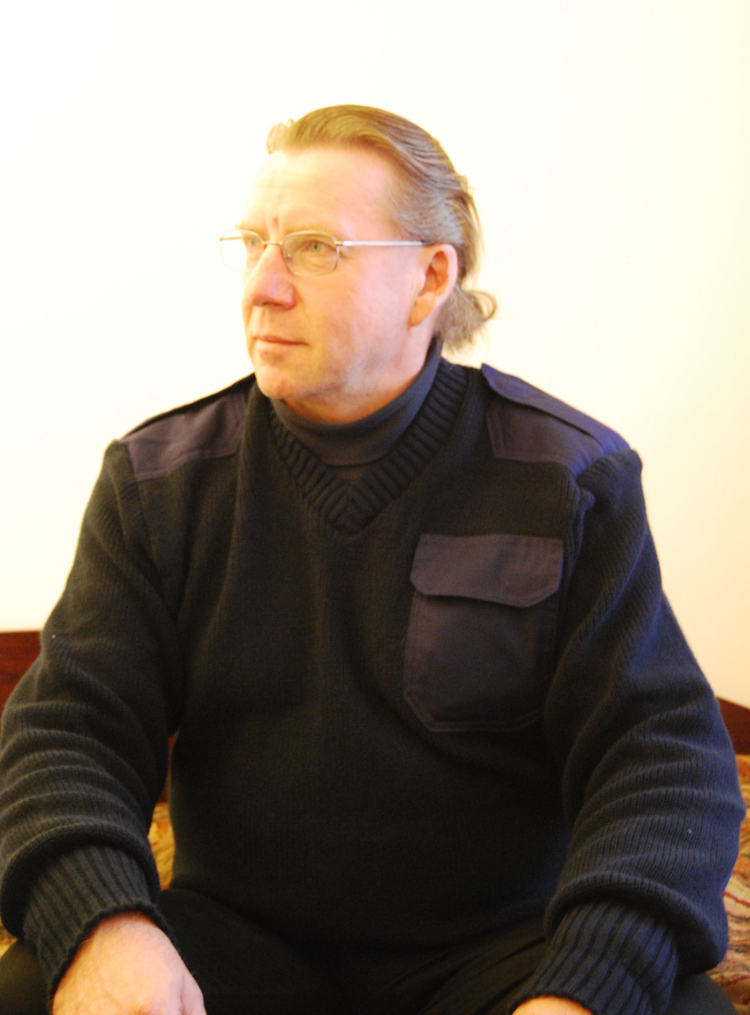 Stanisław Olesiejuk, październik 2009 r.